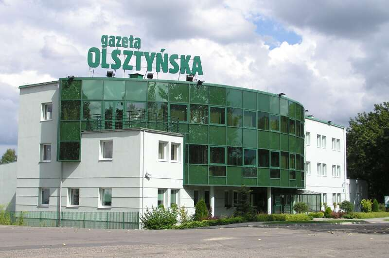 Olsztyn, ul. Tracka 5 - Gazeta Olsztyńska (redakcja)